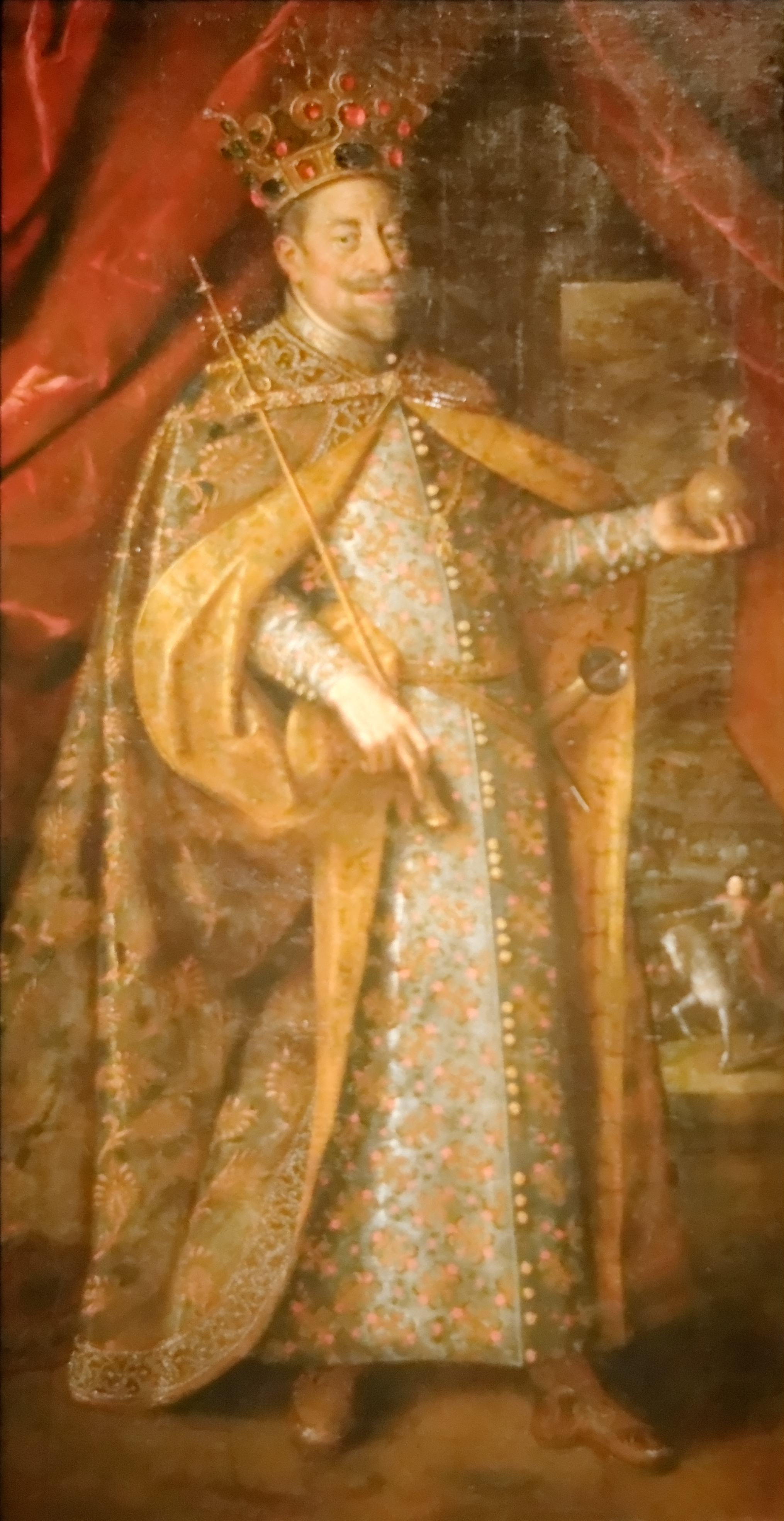 Matthias Ier du Saint-Empire. Exposé au Trésor impérial de la Hofburg, Vienne (Autriche)